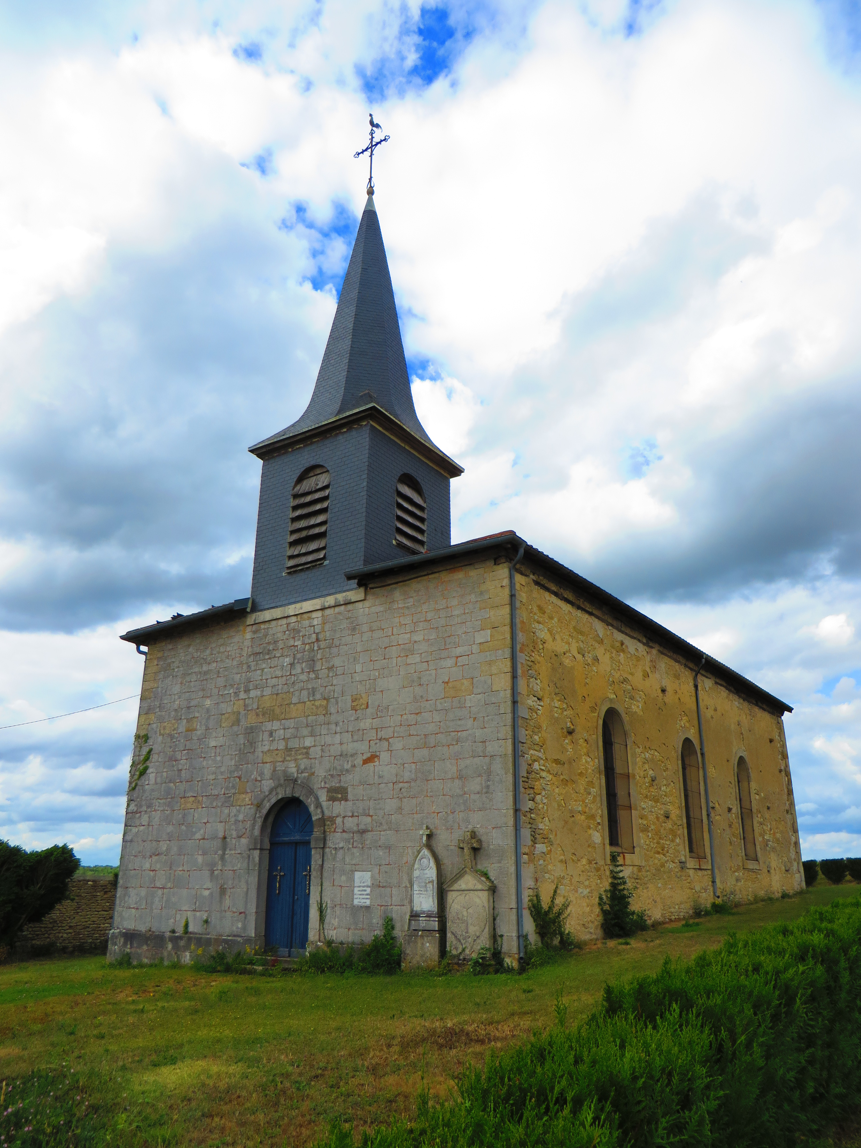 Courouvre L'église Saint-Pierre-ès-Liens